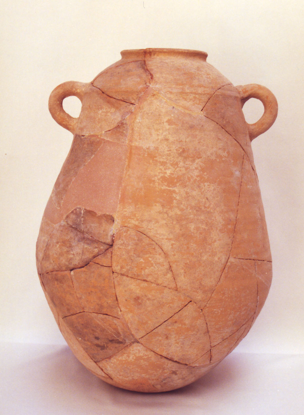 Ánfora ibérica (imitación de R1) Ánfora ibérica de la forma R1. labio vertical redondeado , hombro hemisférico terminado en leve carena, galbo bitroncocónico, base aplanada. Dos asitas de sección circular están ajustadas a la panza desde la carena. Superficie amarillenta sin tratamiento conservado, pasta amarillenta sin desgrasante. Diám. borde: 12 cm, diám. max: 34 cm, alt. cons.: 48 cm.